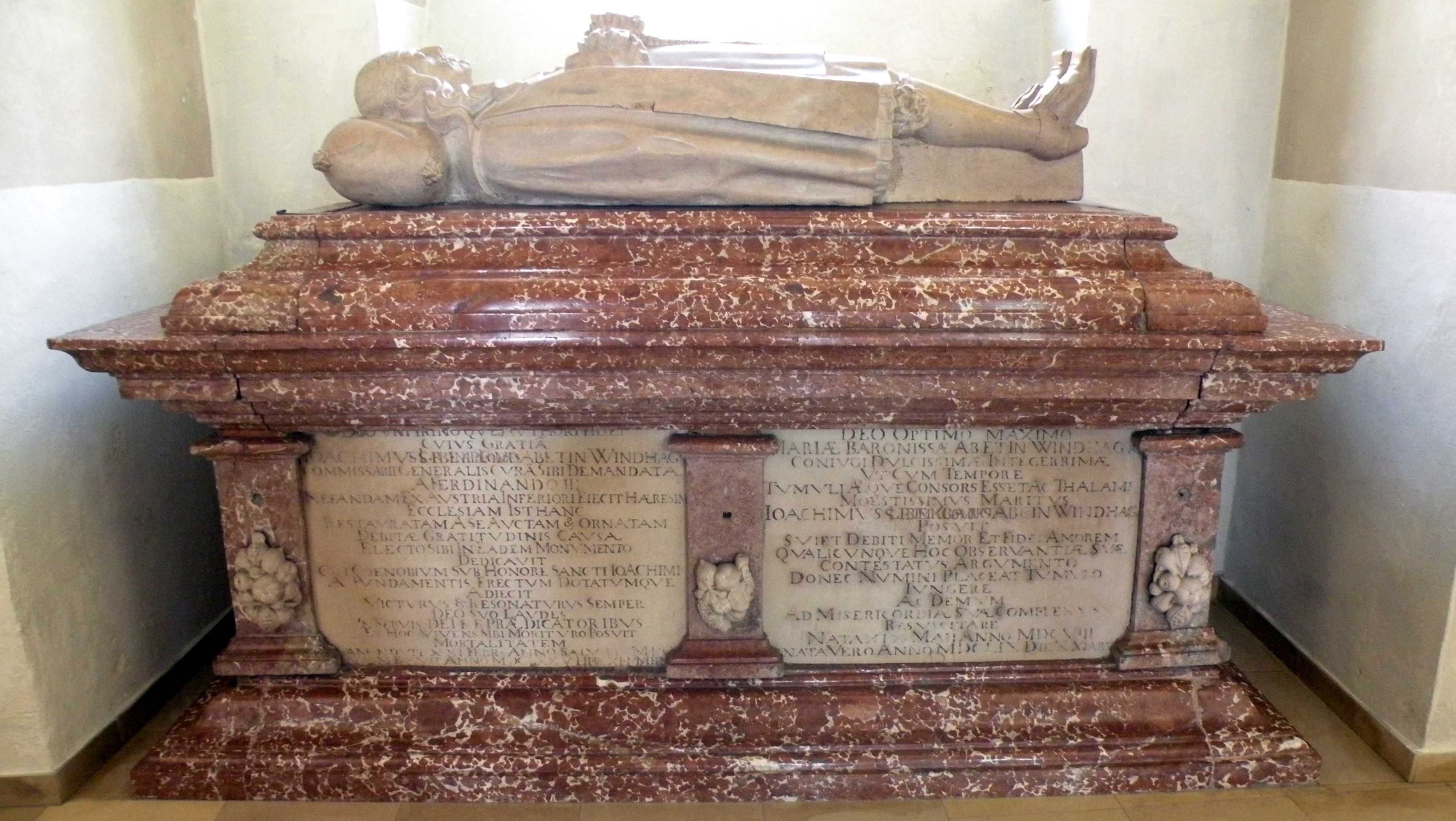 Kenotaph von Joachim Enzmilner, Graf von Windhag